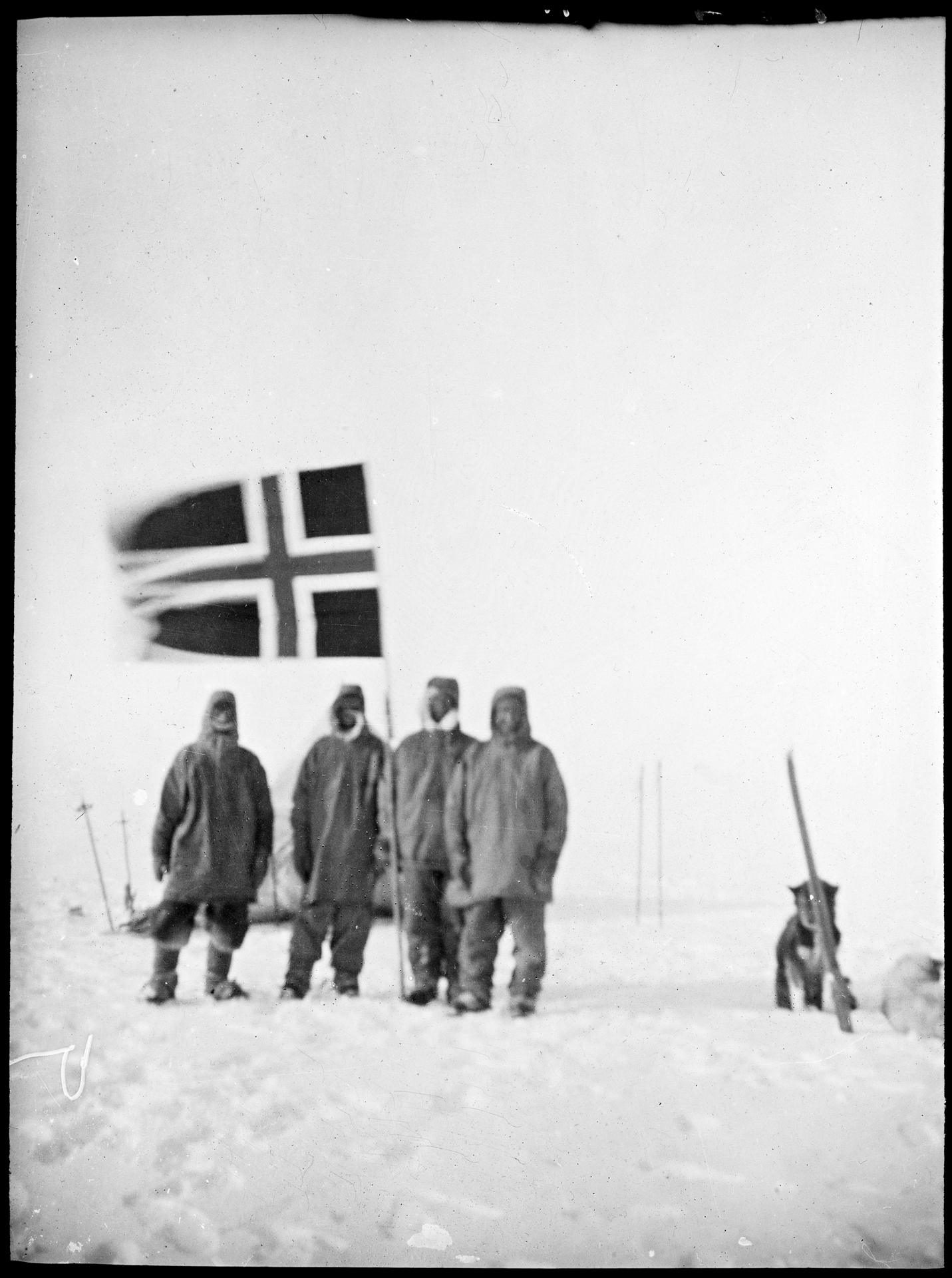 Tittel / Title: Oscar Wisting, Olav Bjaaland, Sverre Hassel og Roald Amundsen på Sydpolen Motiv / Motif: Positiv glassplate. Dato / Date: 14. desember 1911 Fotograf / Photographer: Helmer Hanssen (1870-1956) Sted / Place: Antarktis, Sydpolen Eier / Owner Institution: Nasjonalbiblioteket / National Library of Norway Lenke / Link: Bildesignatur / Image Number: bldsa_NPRA0524